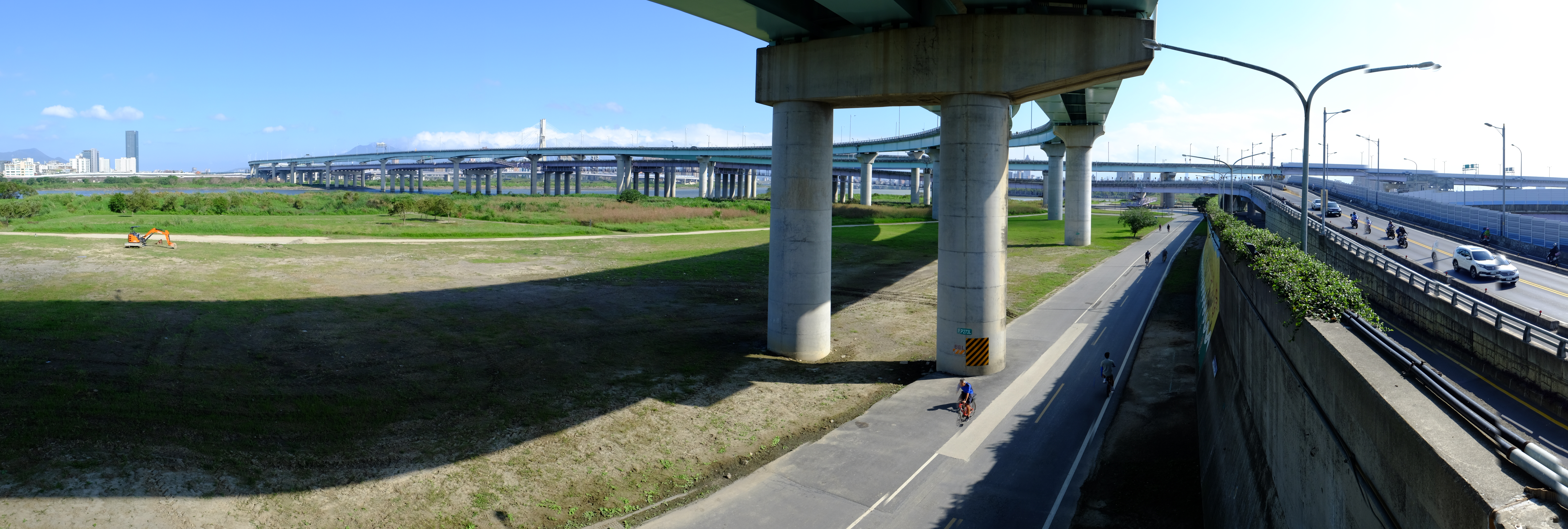 重翠大橋